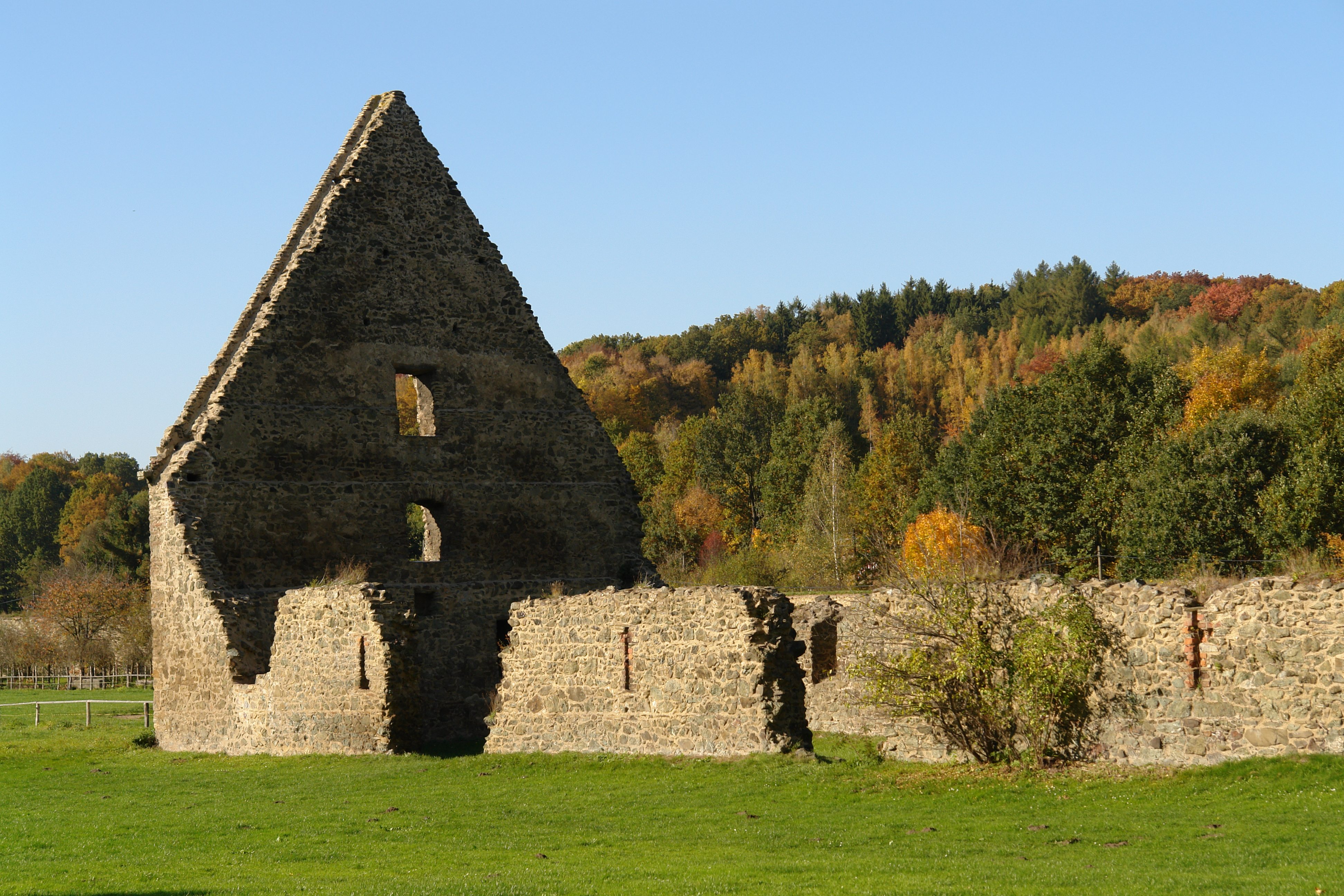 Schüttgebäude im Kloster Altzella